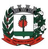 Brasão do Município de Palmeira D'Oeste, SP - Brasil